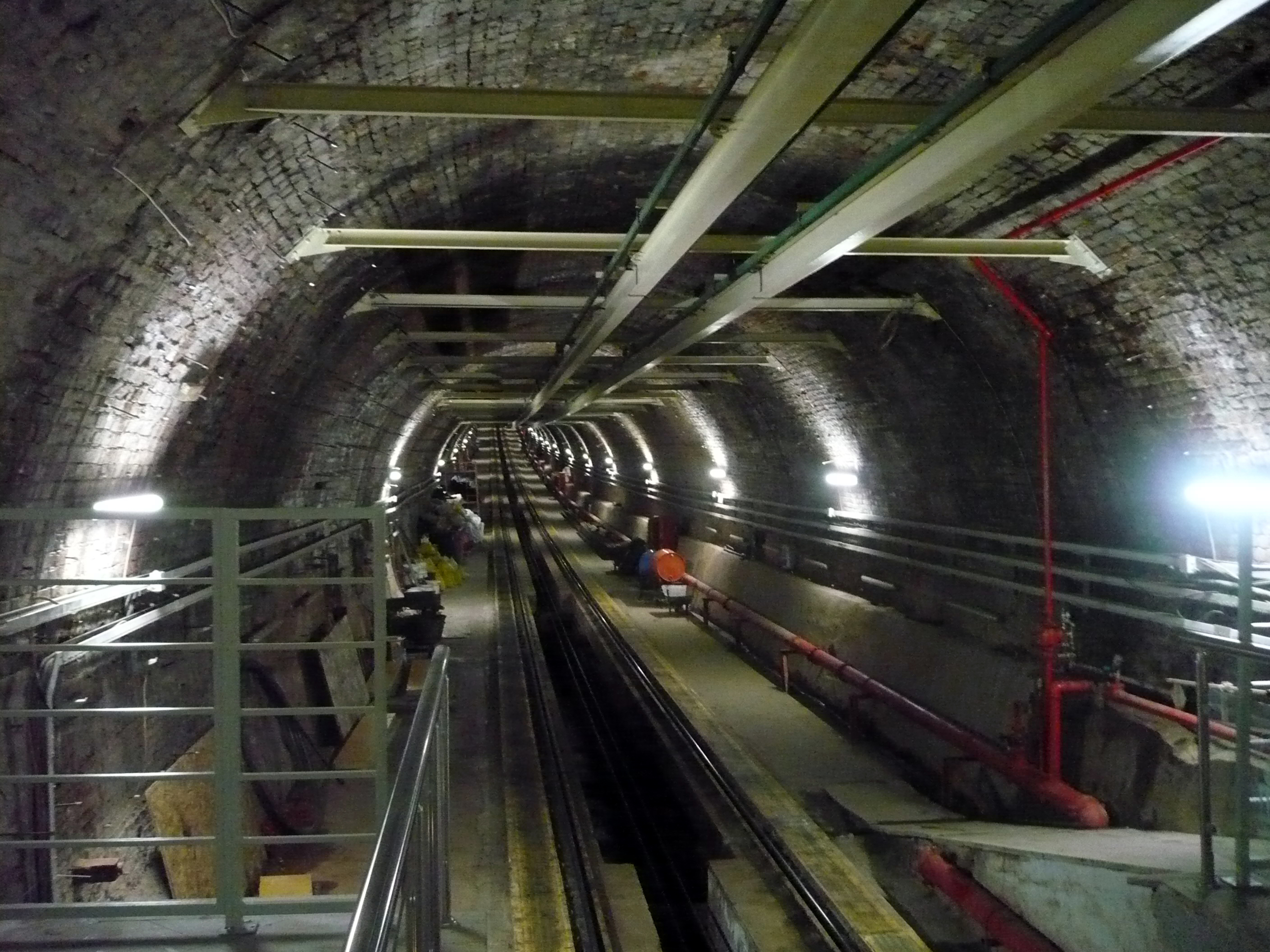 Karaköy part of Tünel, Karaköy, İstanbul